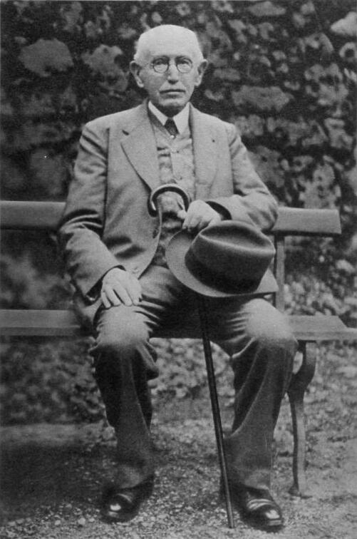 Alfred Dreyfus aged 76